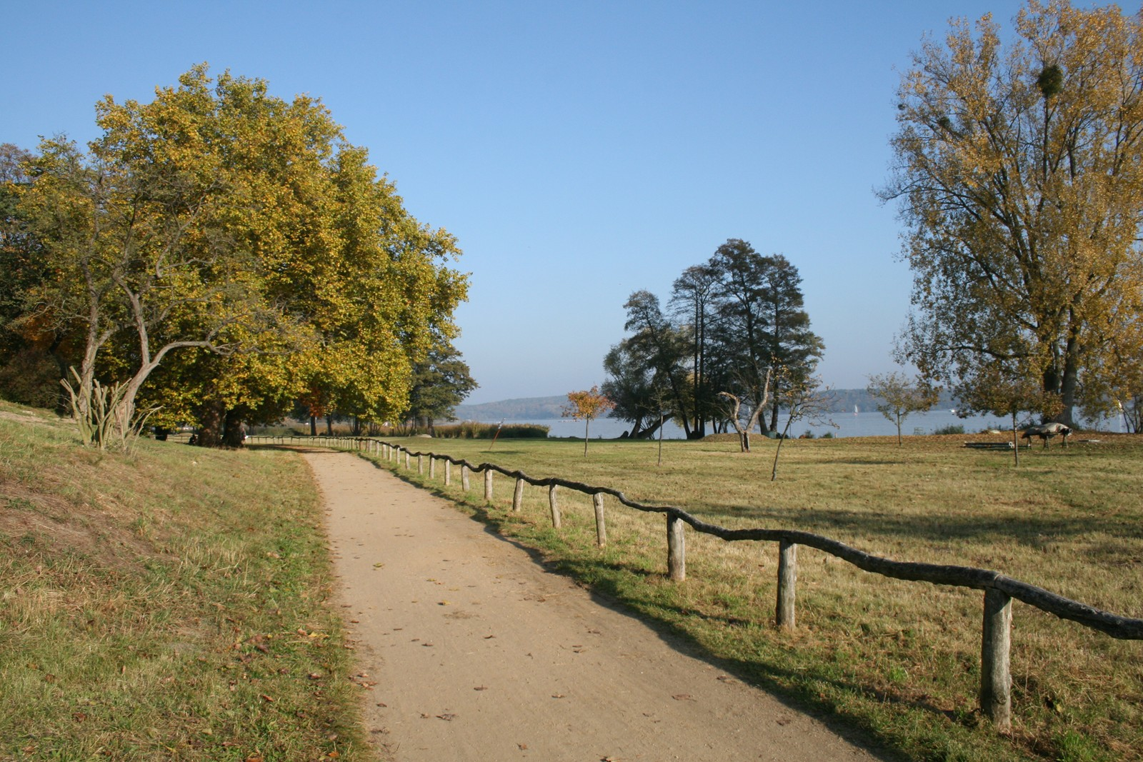 Berlin-Spandau, Neukladower Allee 12. Gutspark Neukladow